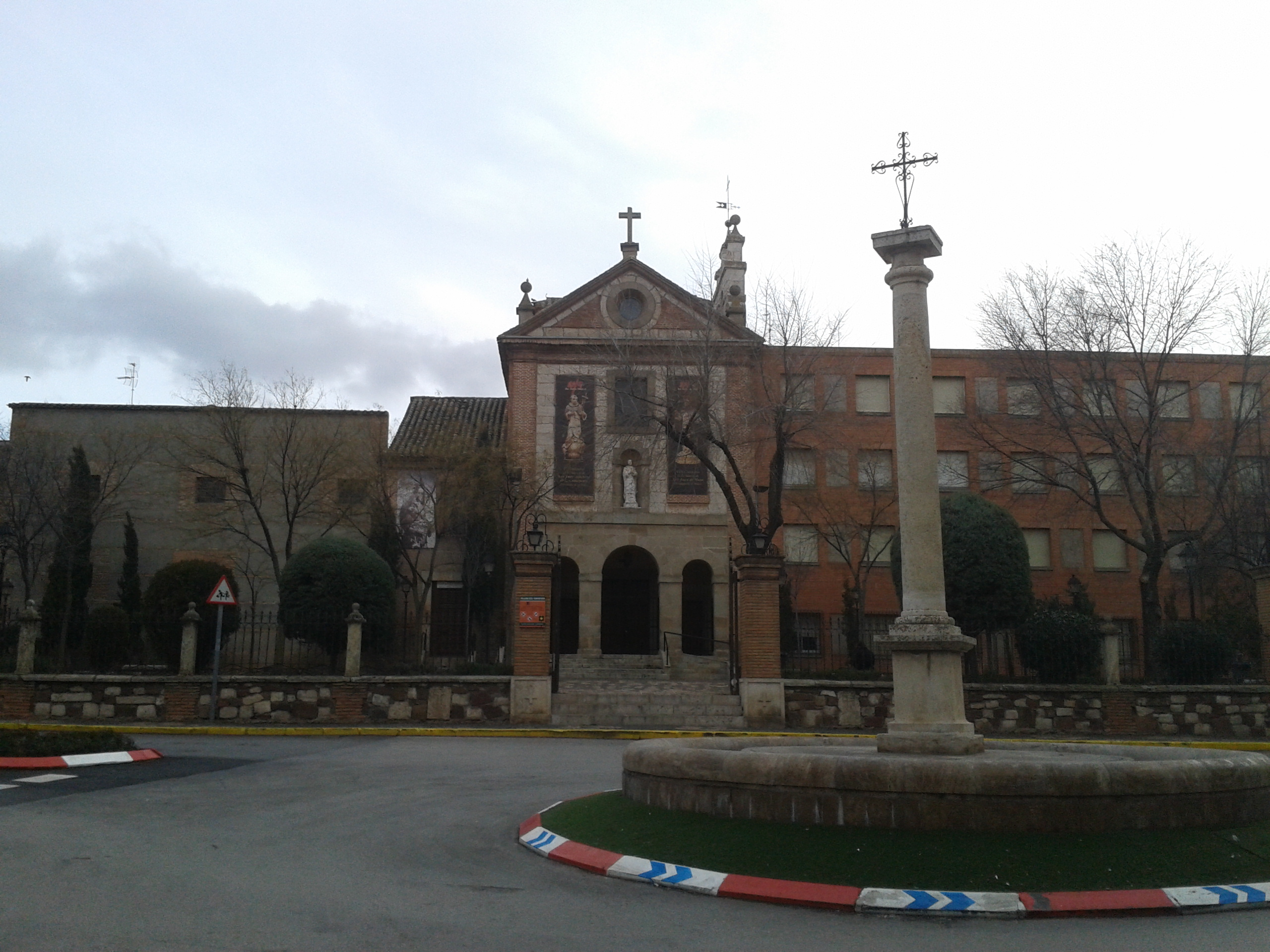 Colegio San Agustín